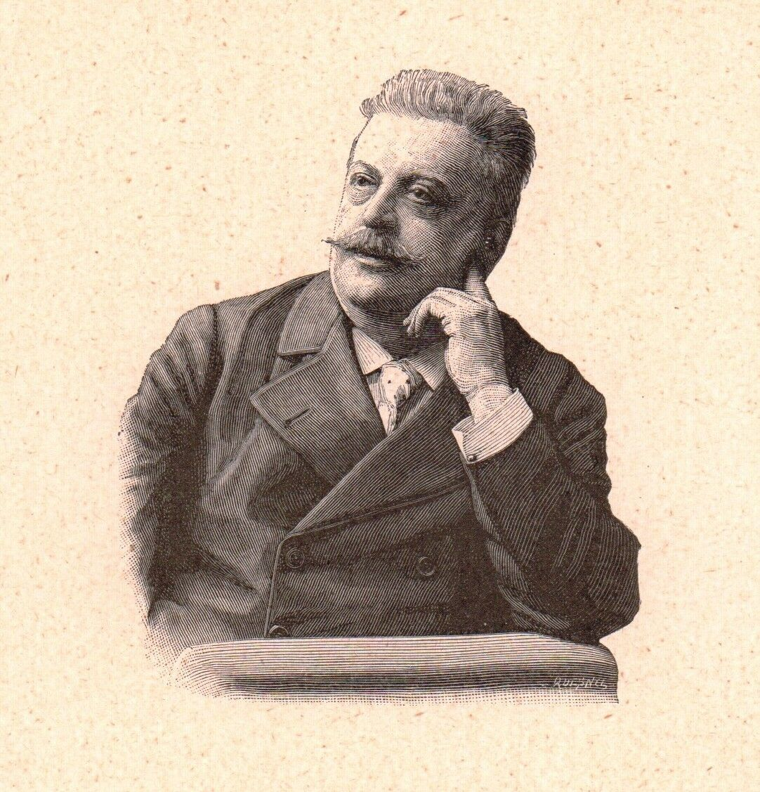 Jules Danbé (1840-1905), French conductor